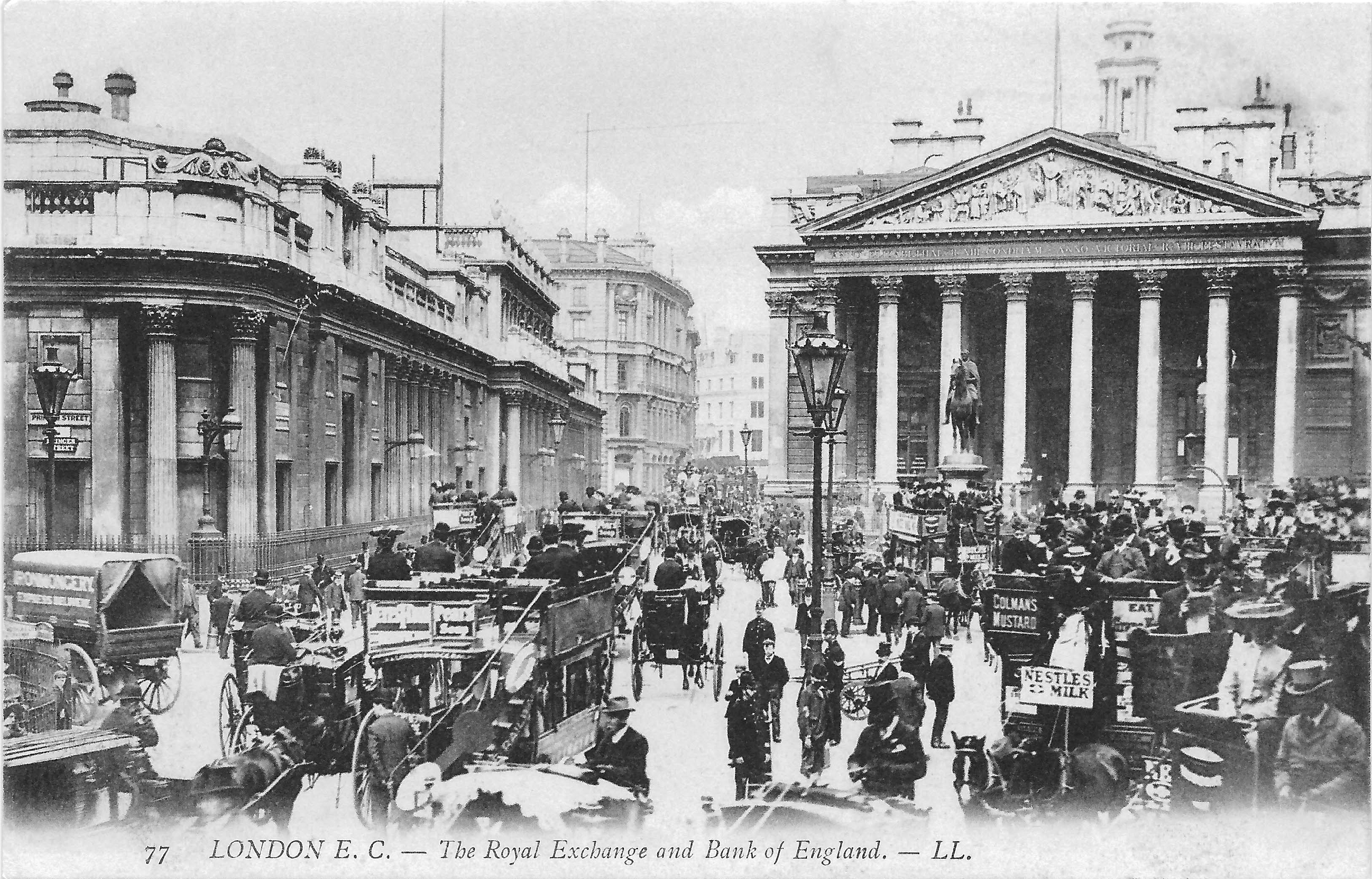 De Koninklijk beurs en Bank of Engeland